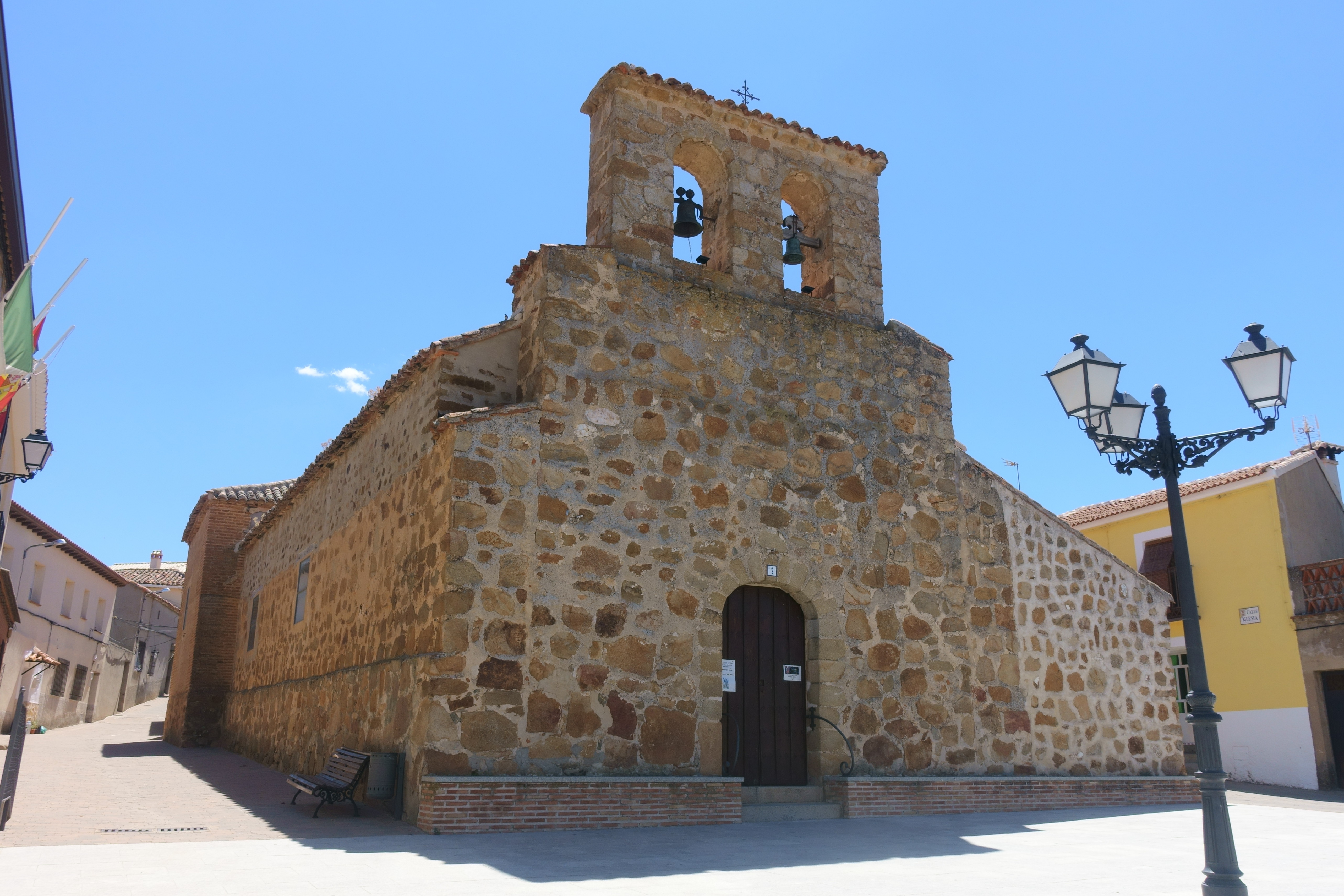 Iglesia de San Andrés Apóstol, en Hontanar (Toledo, España).